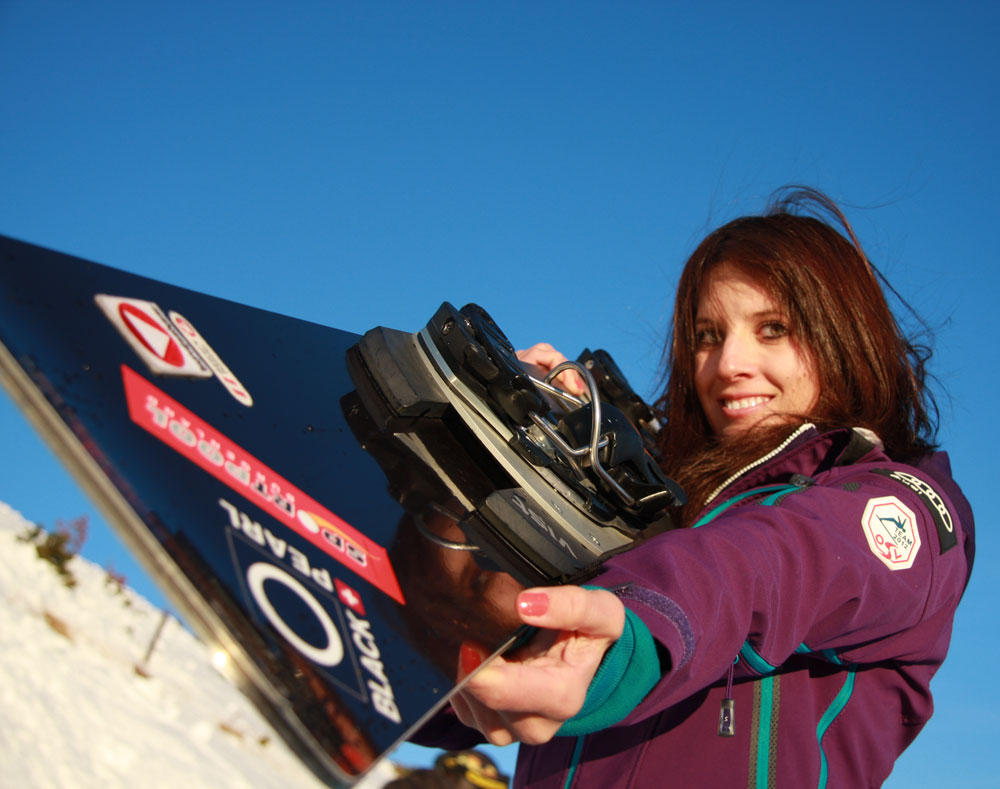 Julia Dujmovits (Präbilch Austria)